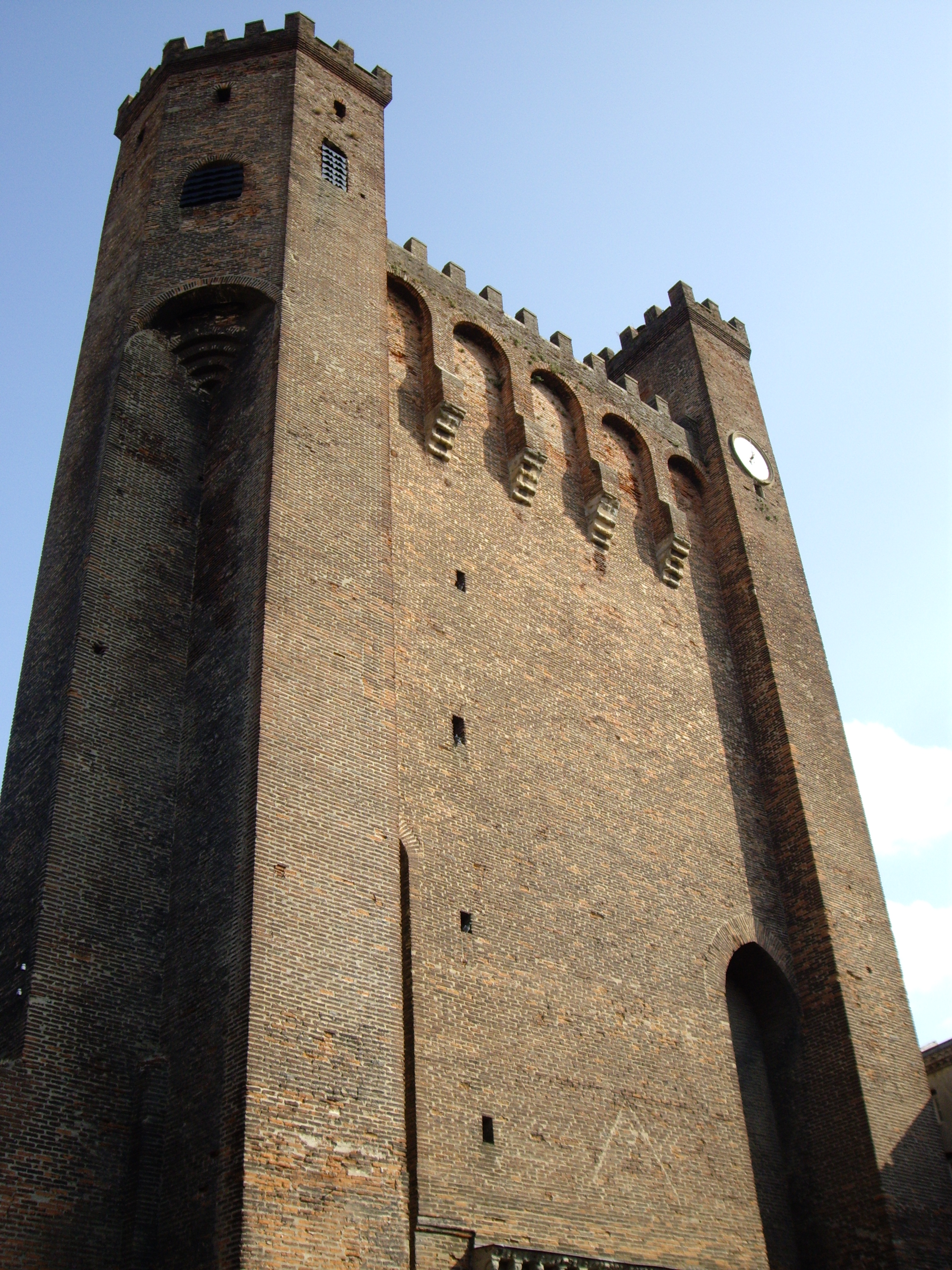 Église Notre-Dame-du-Camp de Pamiers (Ariège, France).